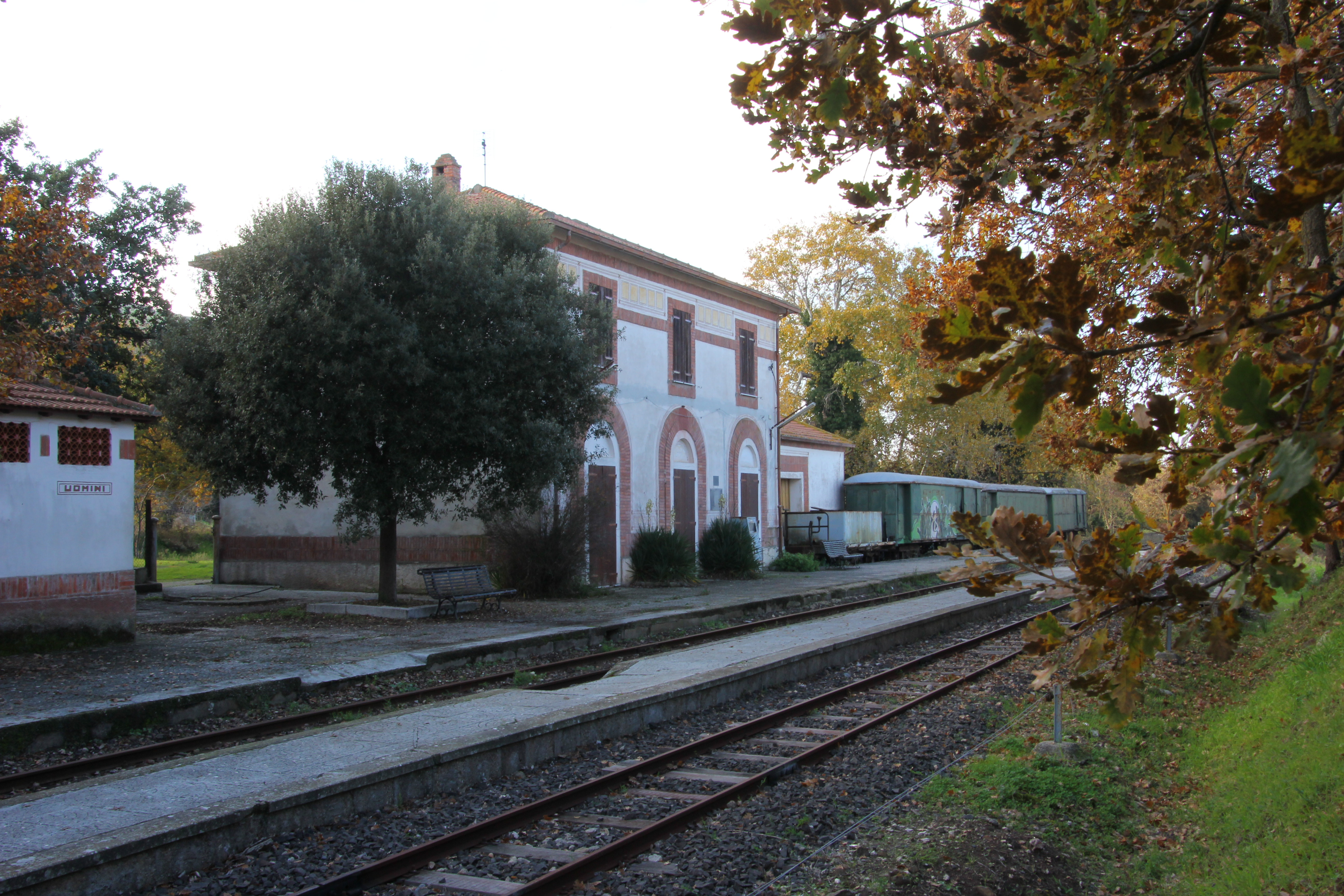 Osilo - Stazione ferroviaria